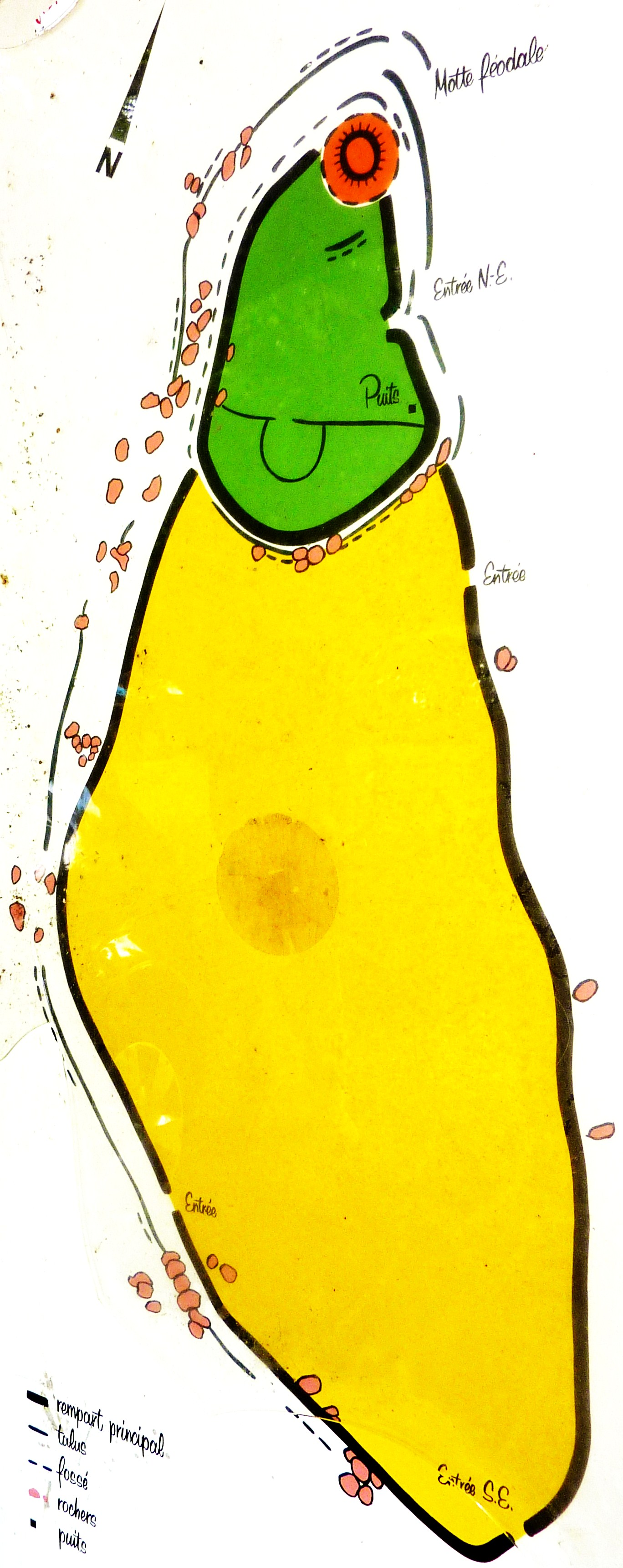 Huelgoat: plan du camp d'Arthus (panneau d'information touristique)